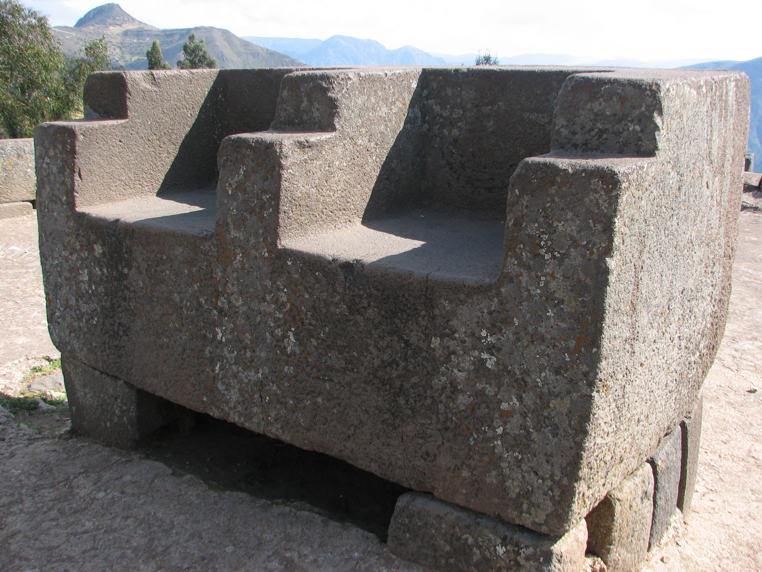 Vilcas Huamán Archaeological site Throne